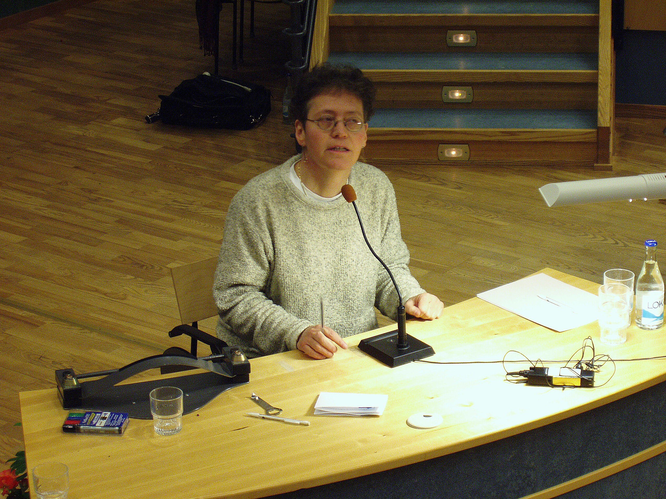 Speaking at Växjö University